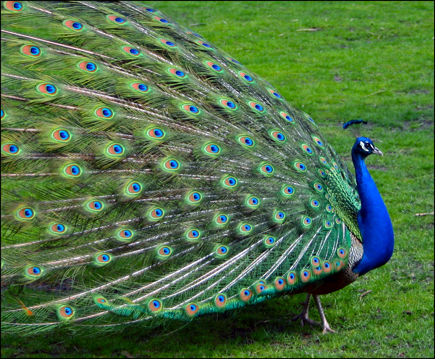 « Je fais une encyclopédie ! ça se voit pas ? ».